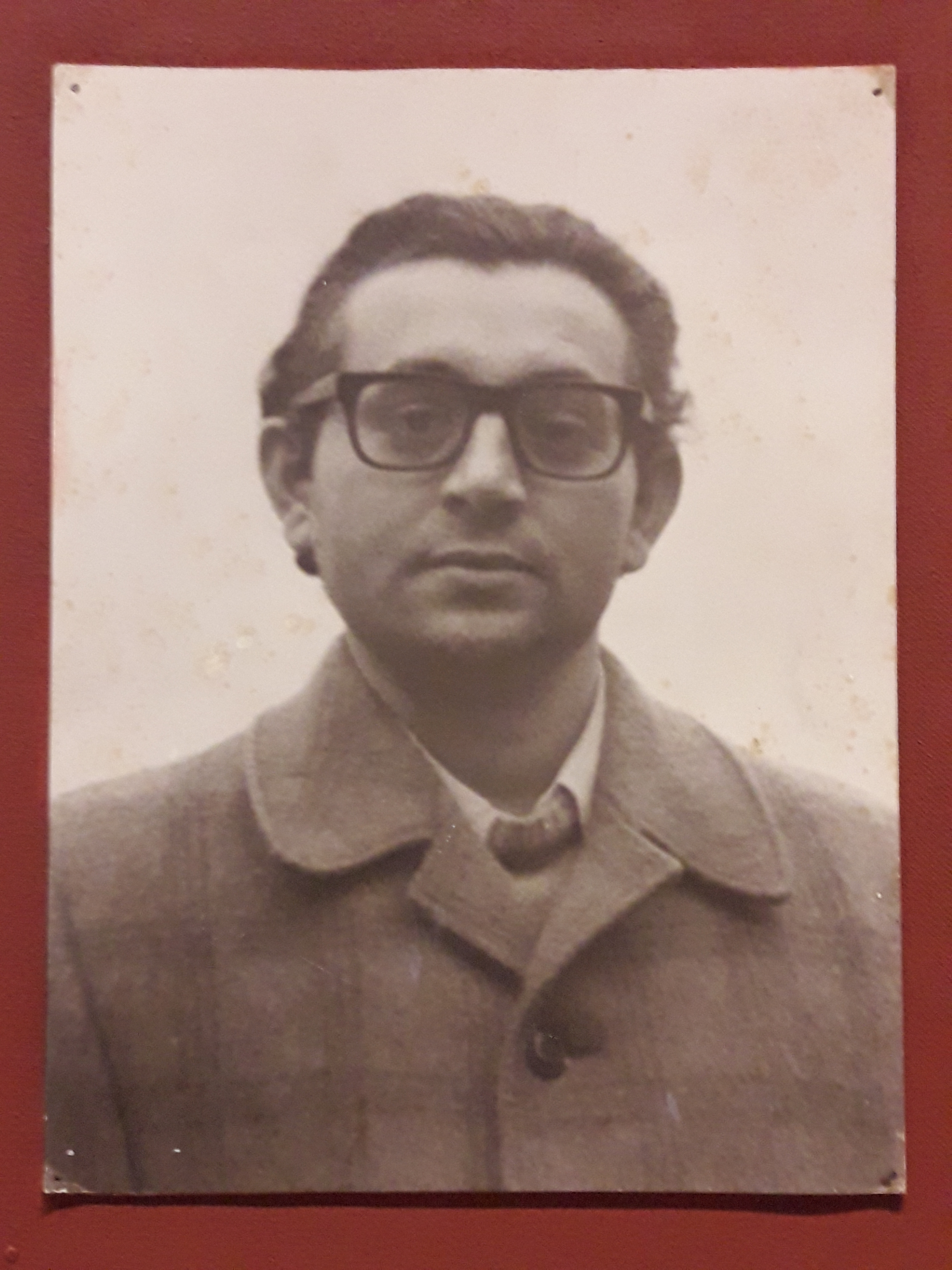 Frei Tito de Alencar